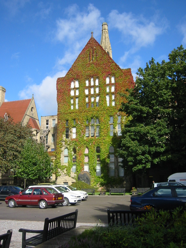 Manchester Üniversitesi